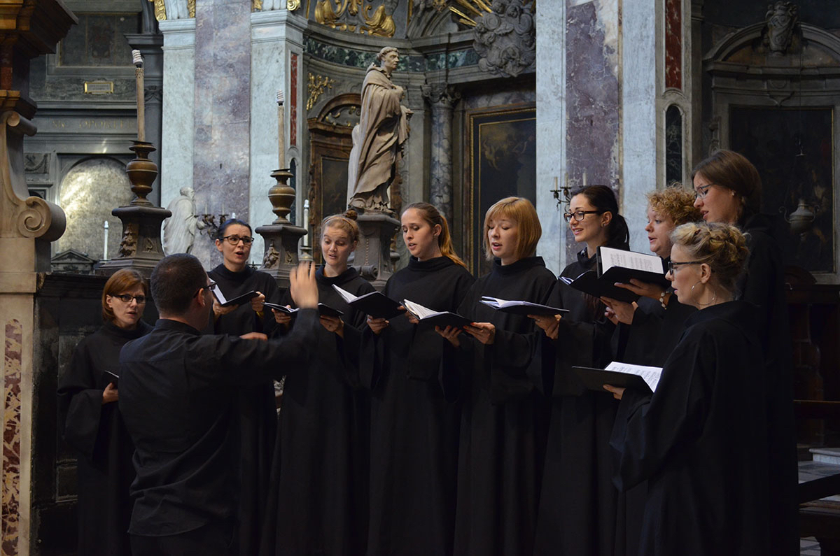 Mulierum Schola Gregoriana Clamaverunt Iusti - koncert we Florencji